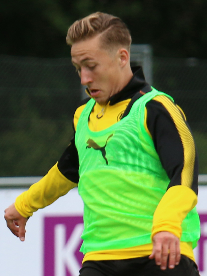 Felix Passlack im BVB Trainingslager in Bad Ragaz 2017